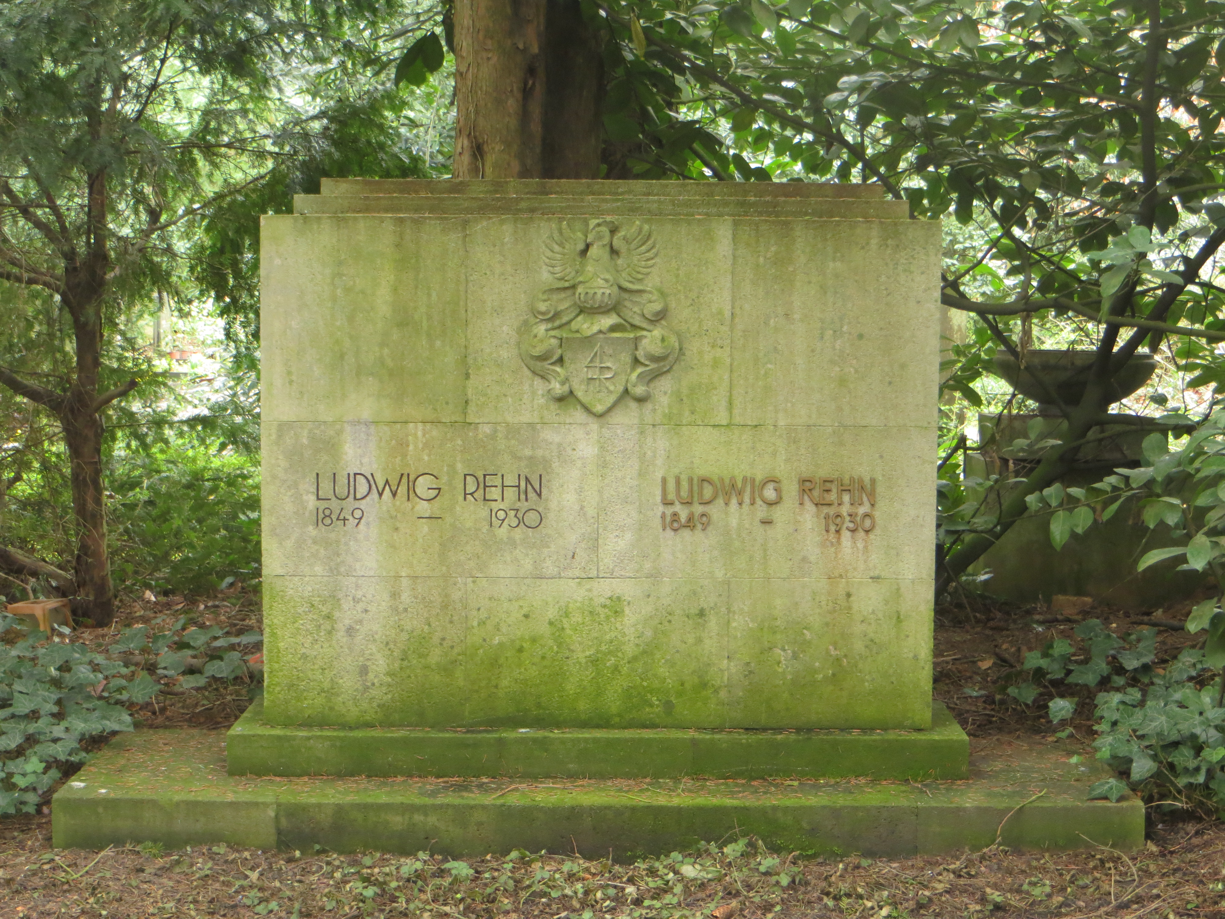 Grabmal des Chirurgen Ludwig Rehn (1849–1930) auf dem Frankfurter Hauptfriedhof